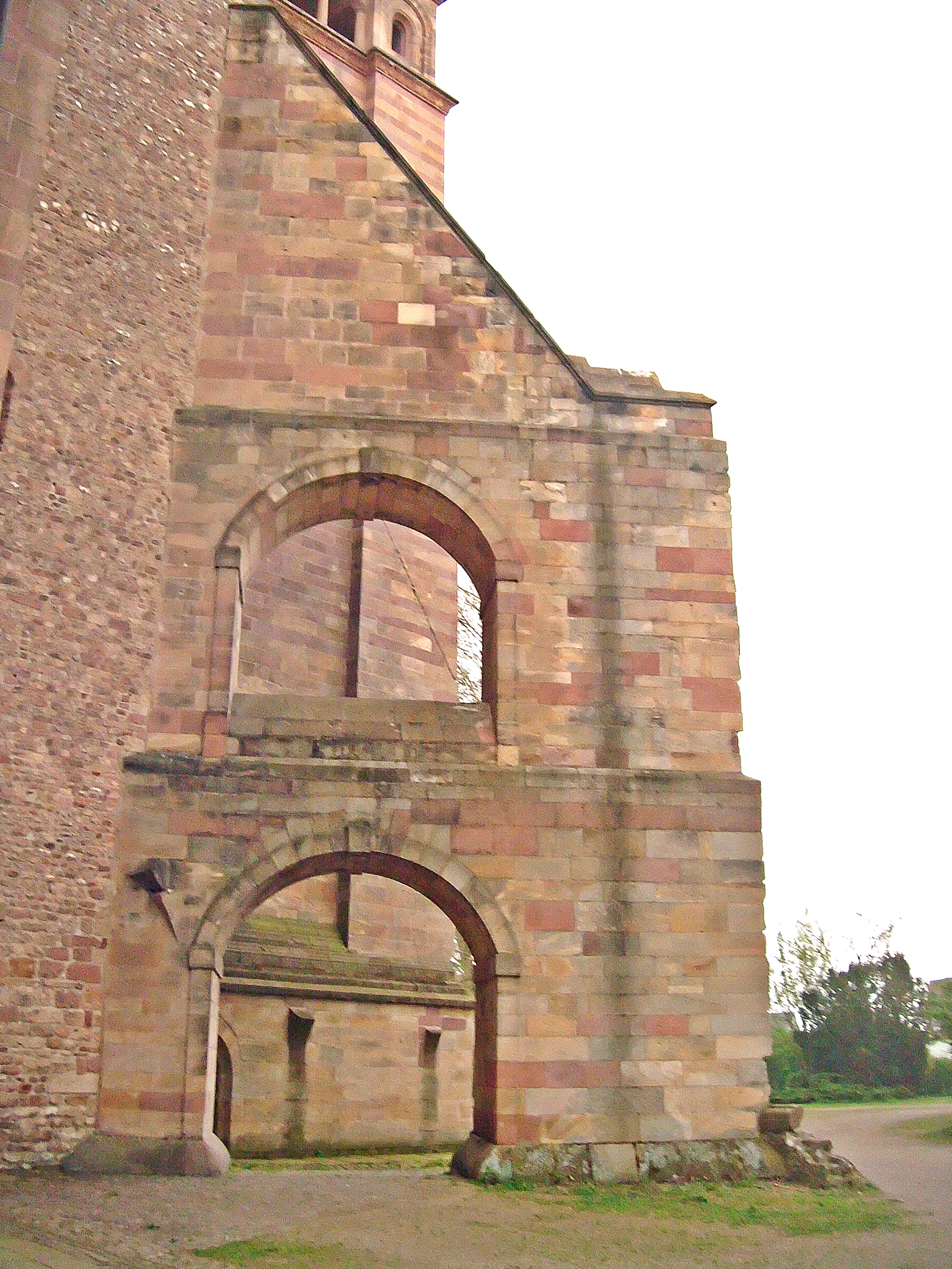 Speyerer Dom, Arkadenbogen zw. ehemaliger Bischofspfalz und Nordostturm des Domes, 1757